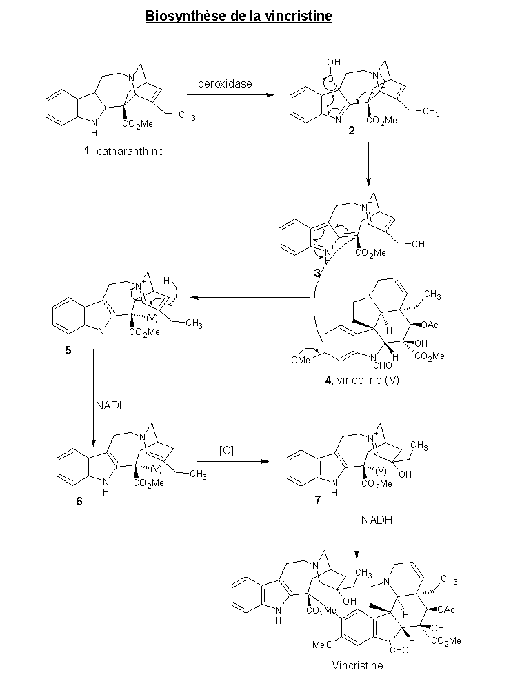 Mécanisme développé de la biosynthèse de vincristine